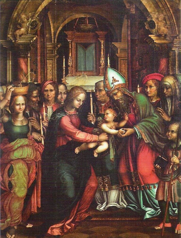 La obra representa el momento en que el Niño Jesús fue presentado por sus padres, según estaba prescrito en la ley judía, en el Templo de Jerusalén.